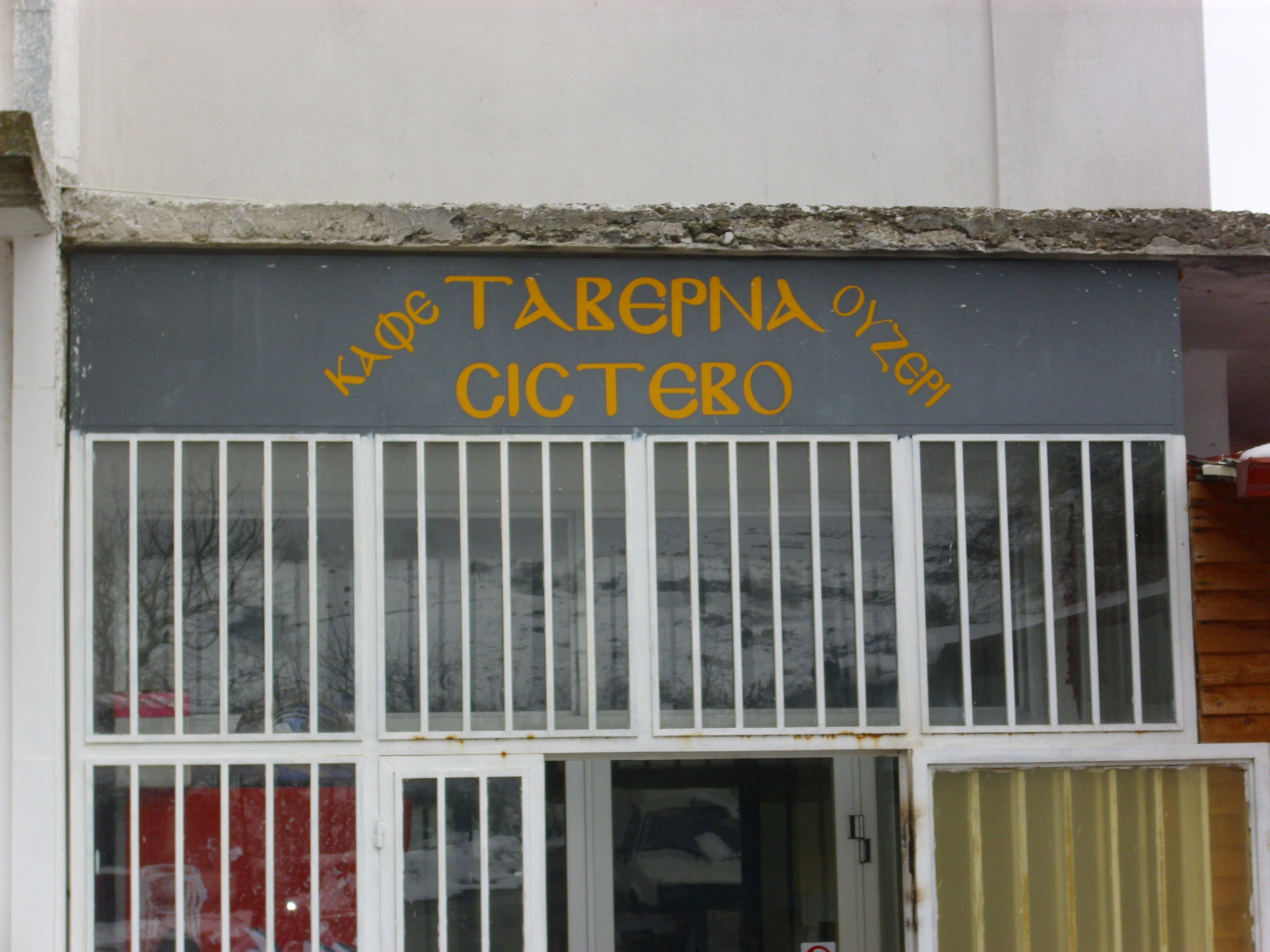 Заведение в село Шестово, днес Република Гърция.